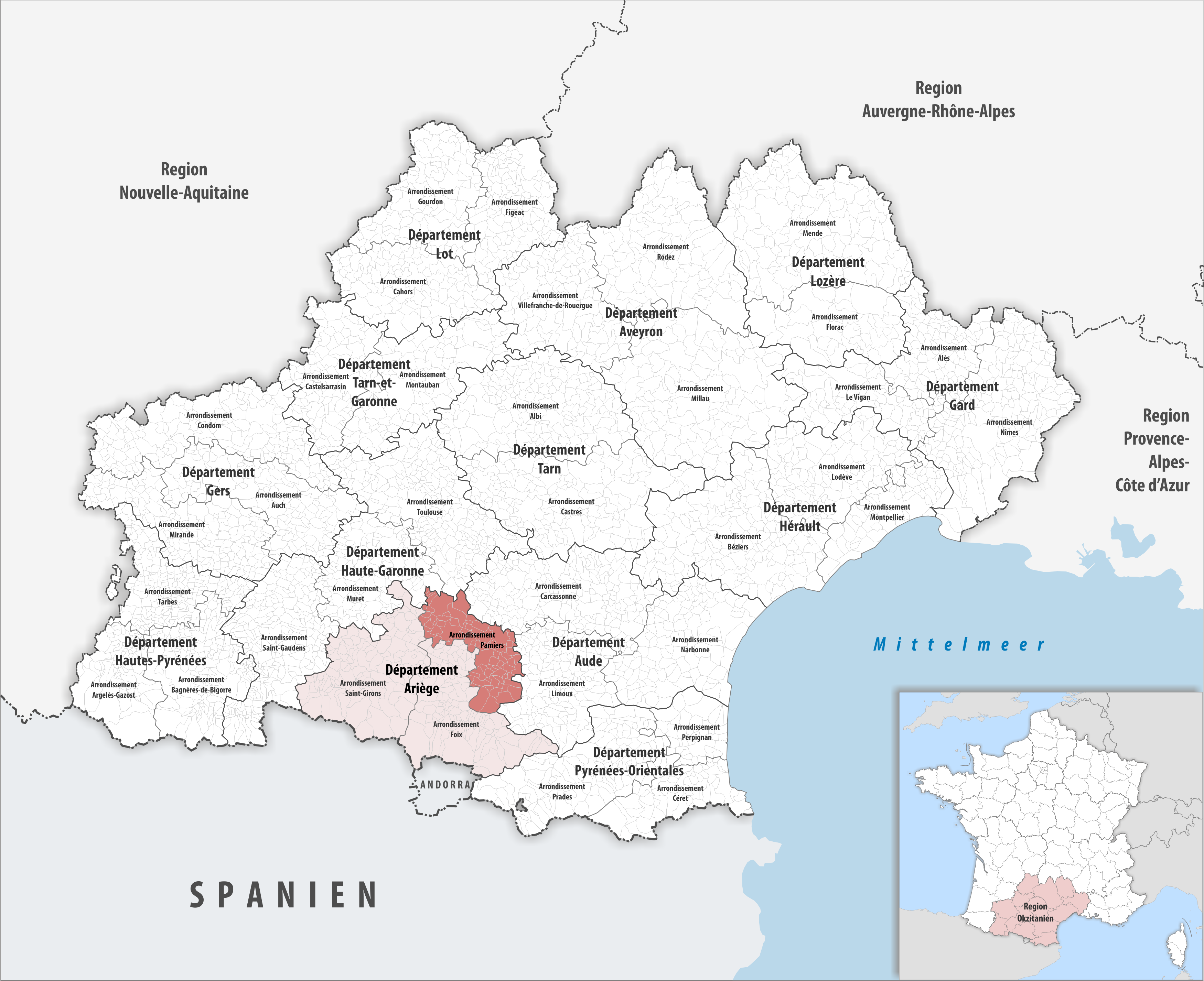 Lage des Arrondissements Pamiers